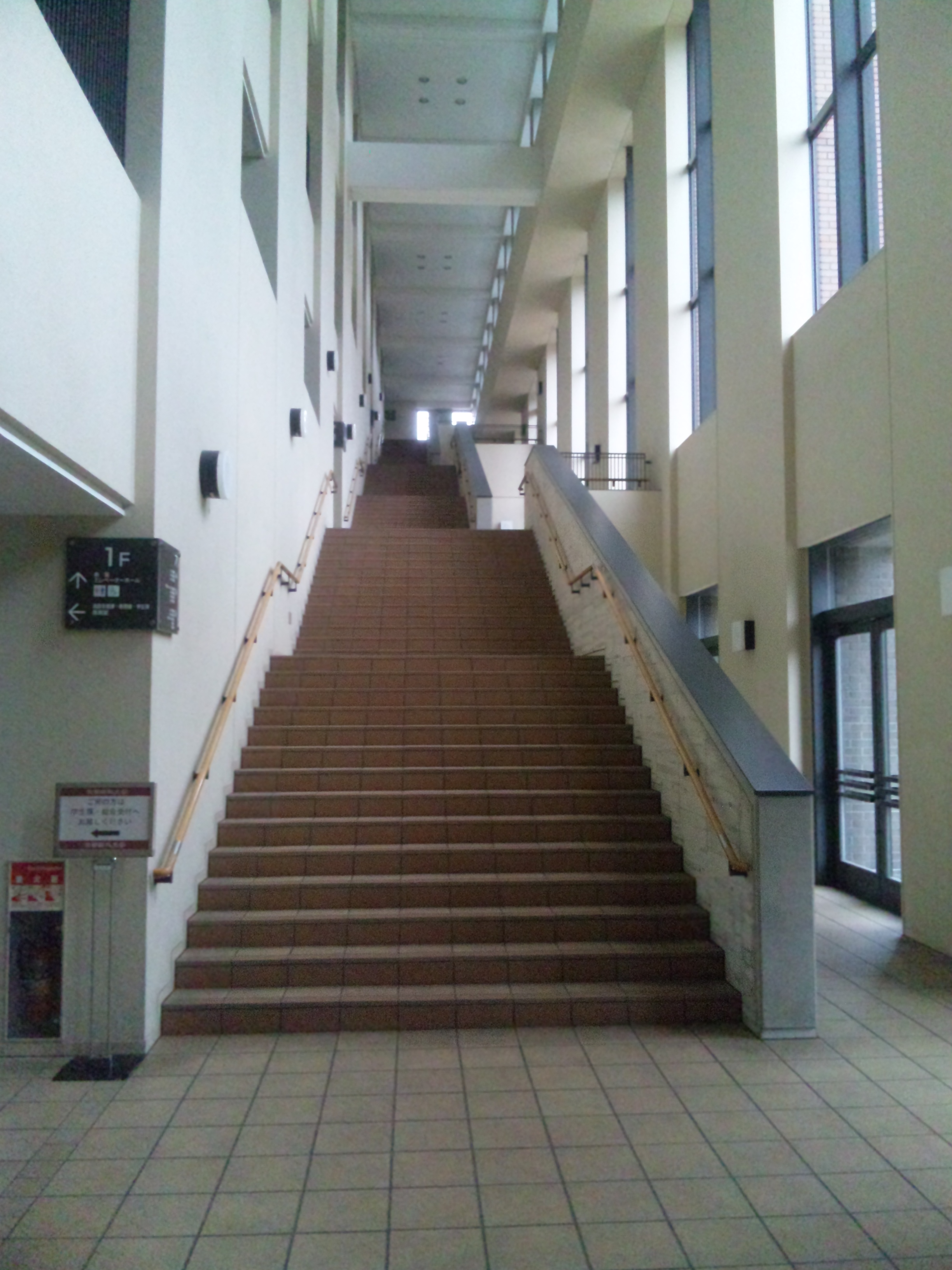 京都薬科大学愛学館の大階段。